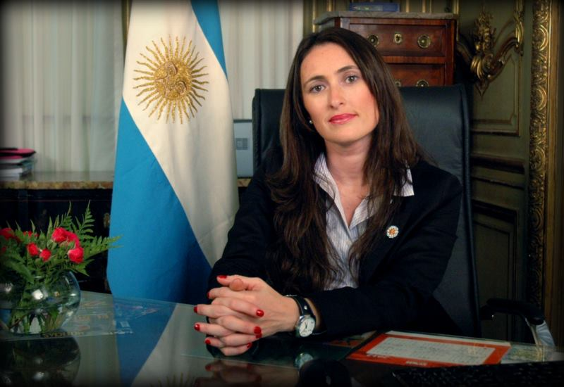 María Elena Troncoso